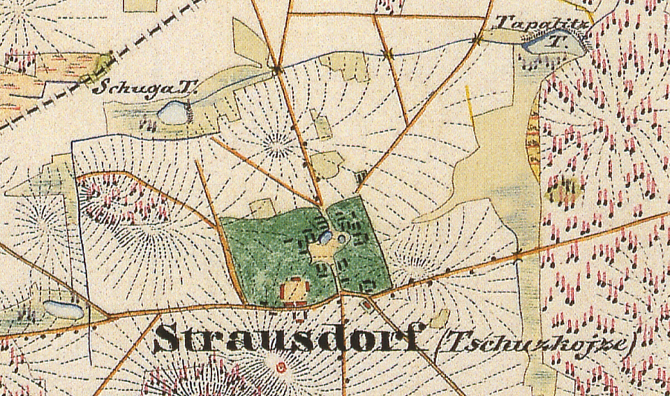 Straußdorf (devastiert), auf dem Urmesstischblatt 4351 Drebkau von 1846 (heute rekultiviert, Areal gehört zur Stadtgemarkung Spremberg, Landkreis Spree-Neiße, Brandenburg